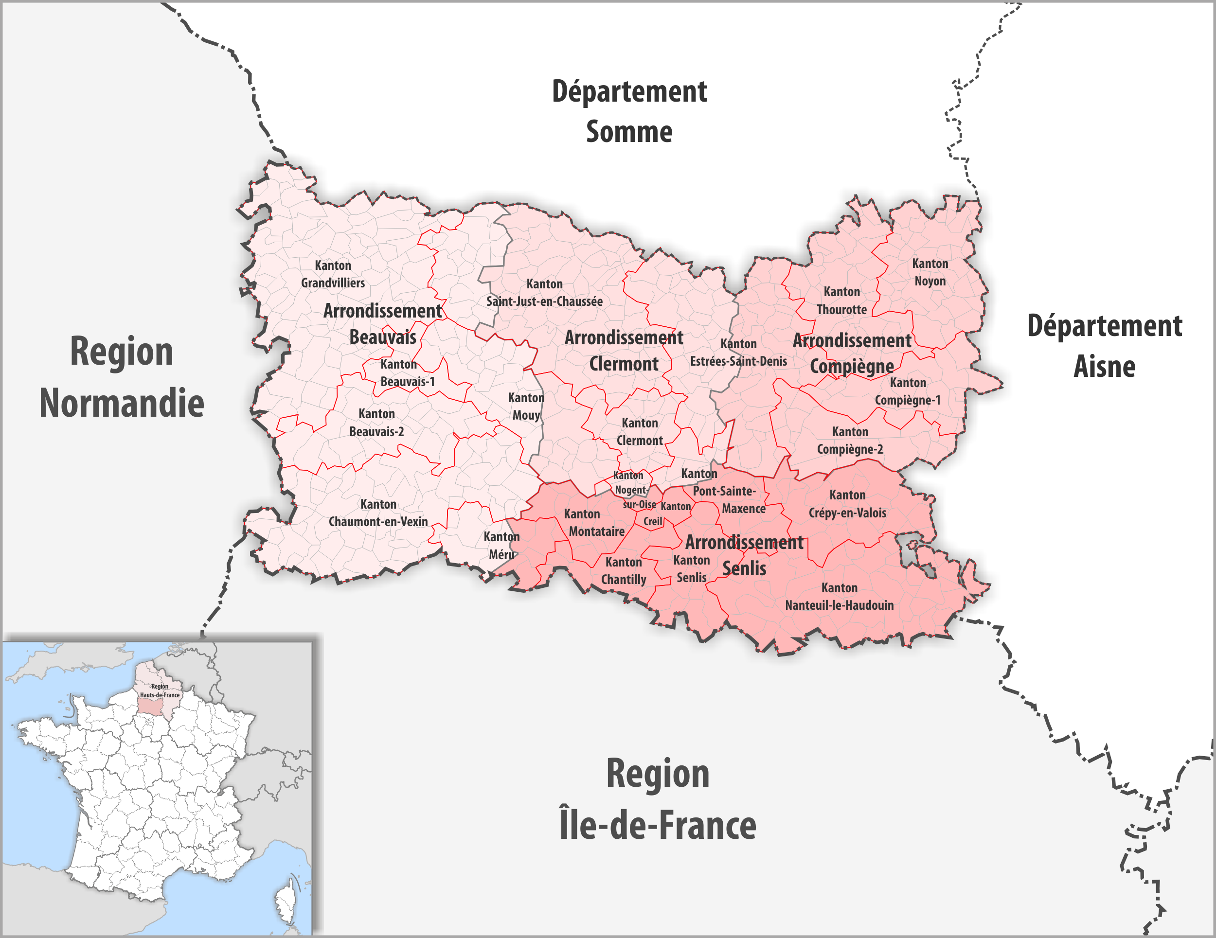 Gemeinden, Kantone und Arrondissemente im Departement Oise